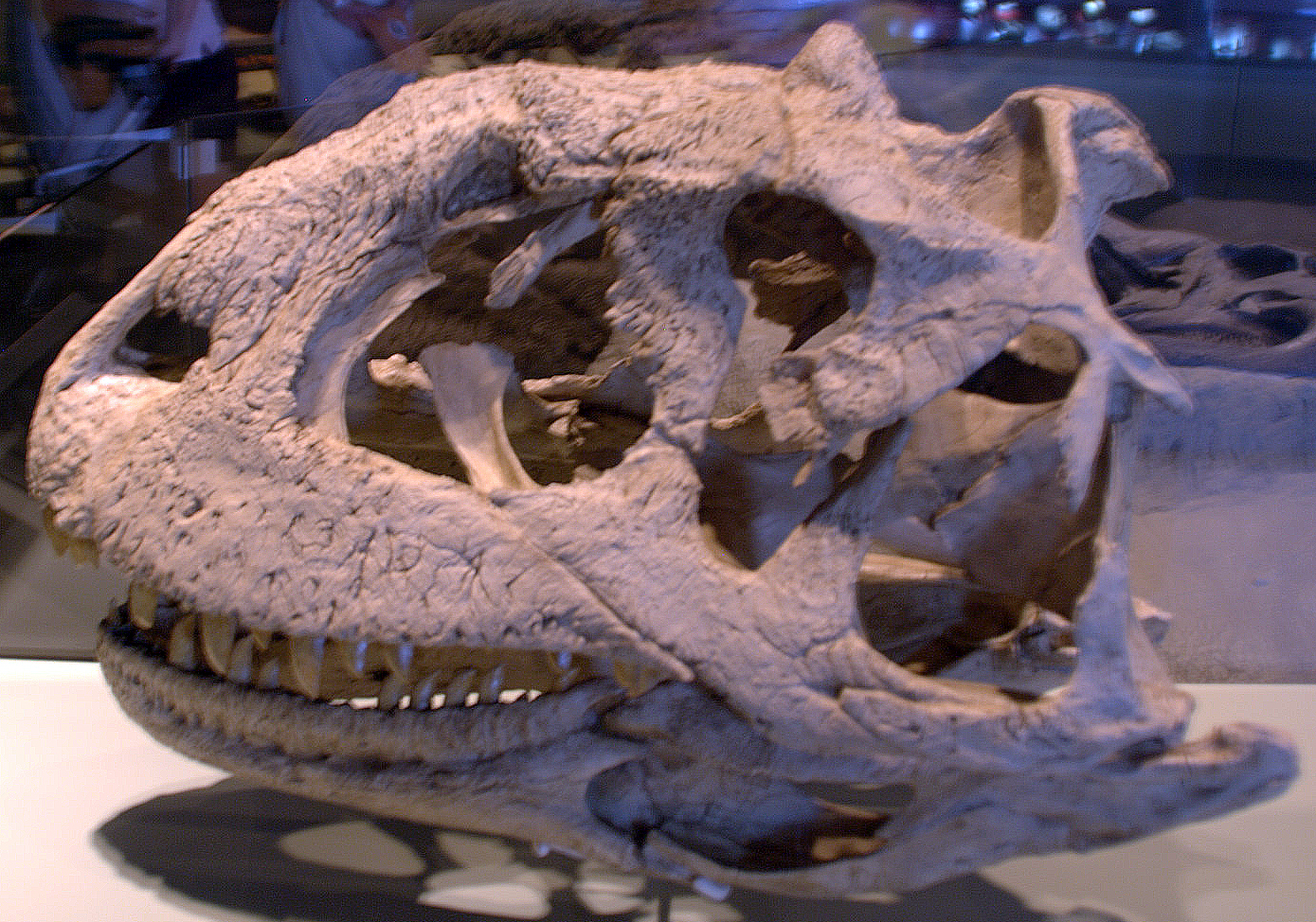 Dinosaurs, Field Museum, Chicago